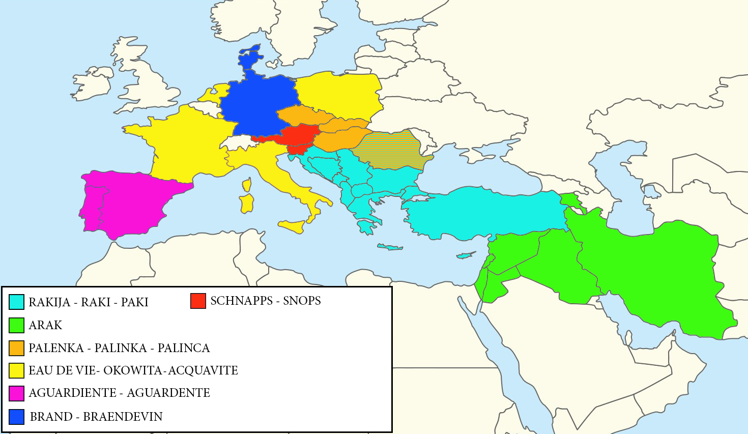 Χάρτης αλκοολούχων ποτών ανά οικογένειες